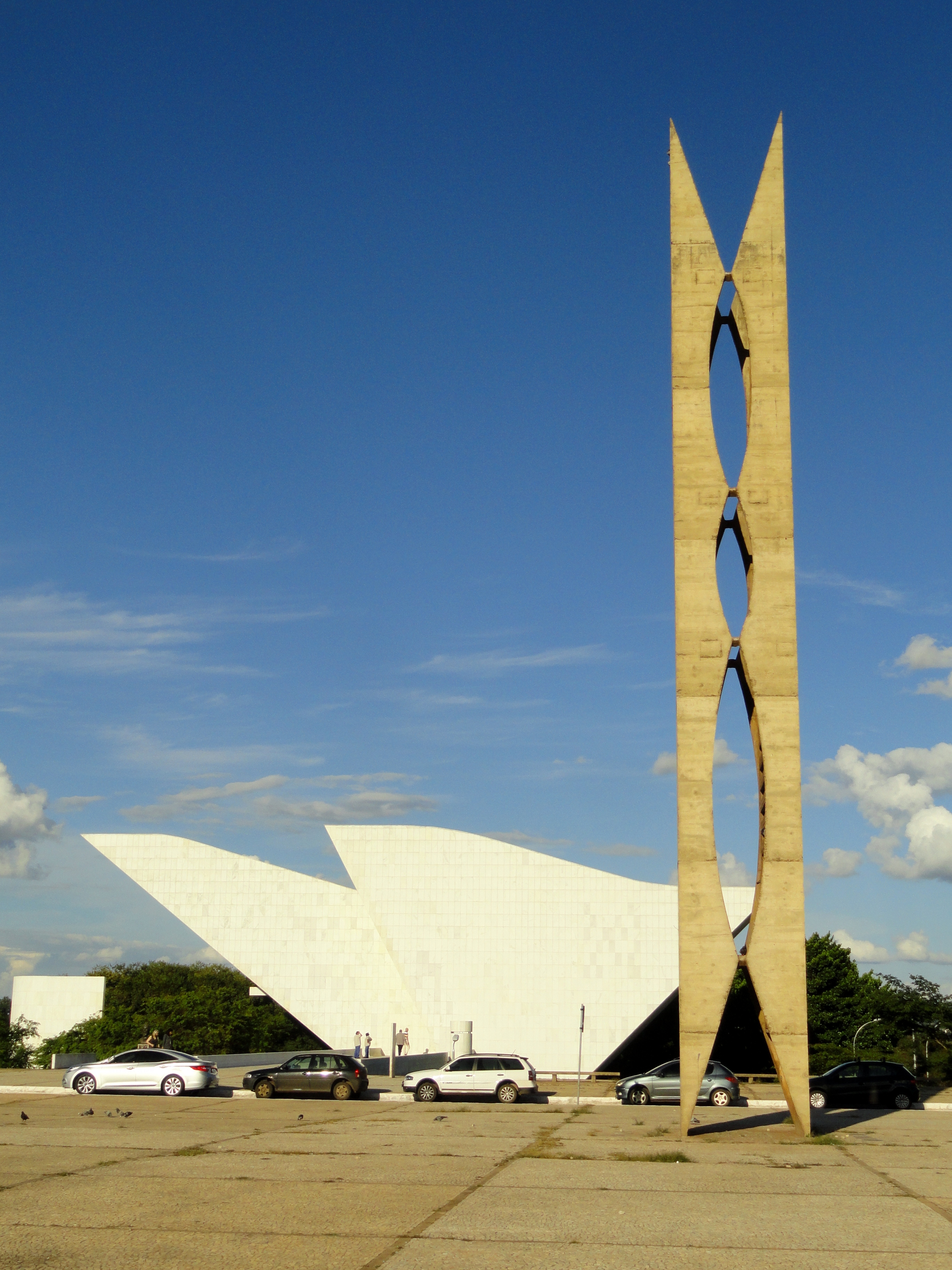 O Pombal by Oscar Niemeyer, Brasília, Brazil.